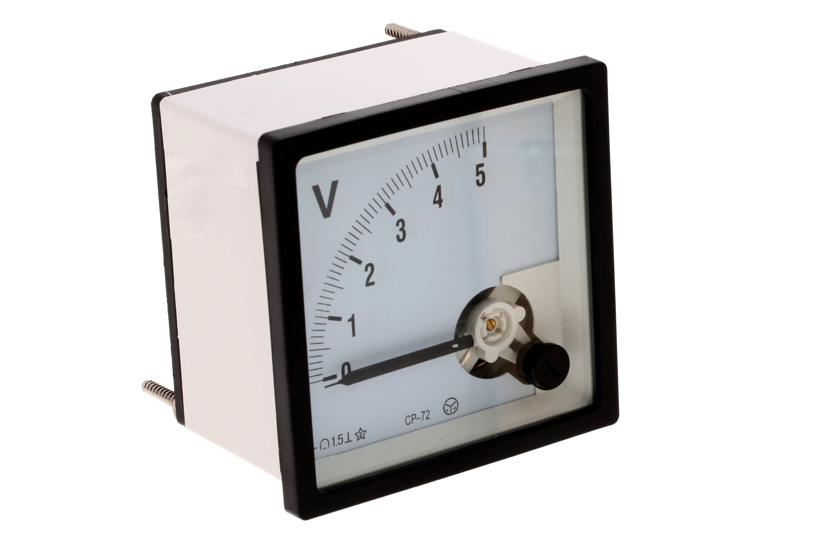 Analog DC voltmeter with 5V range.